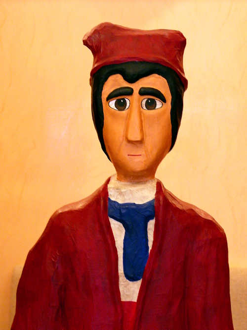 Alcoi's most famous puppet character Tirisiti captured in a papier-mâché statue